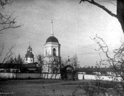 Ладанський (Підгірський) Покровський монастир (недіючий)